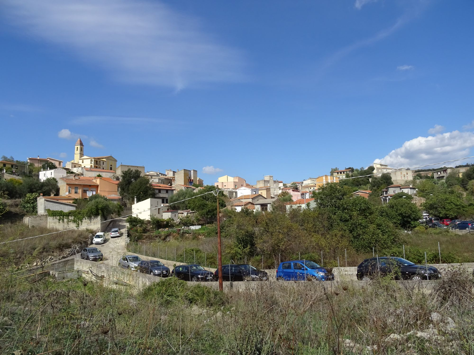 Panorama di Onanì. Vista da santa Maria.